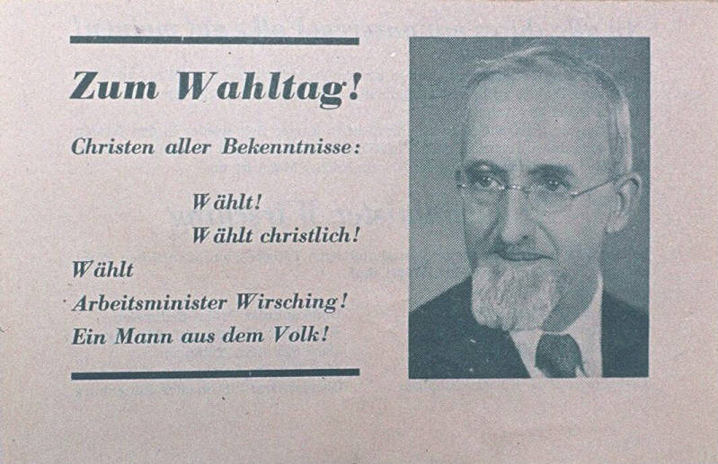 Zum Wahltag! Christen aller Bekenntnisse: Wählt! Wählt christlich! Wählt Arbeitsminister Wirsching ... Abbildung: Porträtfoto Kommentar: Württemberg-Hohenzollern Plakatart: Kandidaten-/Personenplakat mit Porträt Objekt-Signatur: 10-001: 117 Bestand: Plakate zu Bundestagswahlen (10-001) GliederungBestand10-18: Plakate zu Bundestagswahlen (10-001) » Die 1. Bundestagswahl am 14. August 1949 » CDU » Mit Porträtfoto Lizenz: KAS/ACDP 10-001: 117 CC-BY-SA 3.0 DE